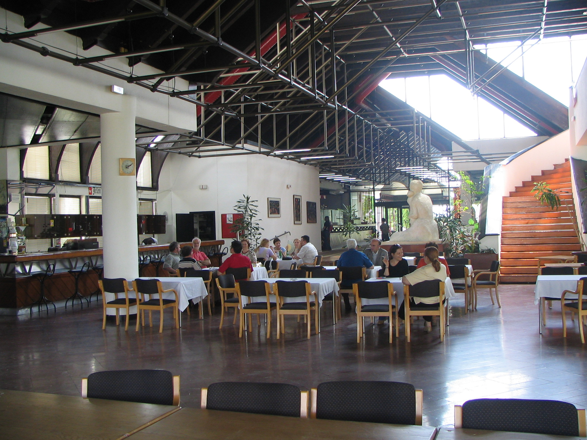 Бања Јунаковић (ентеријер) фото: Михаило Грбић, 5. јуни 2007.